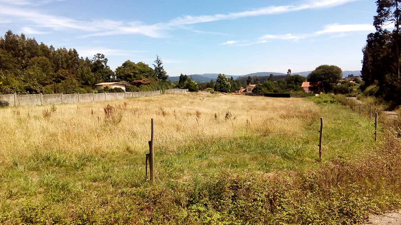 Vista do Pico do Vento, O Val.